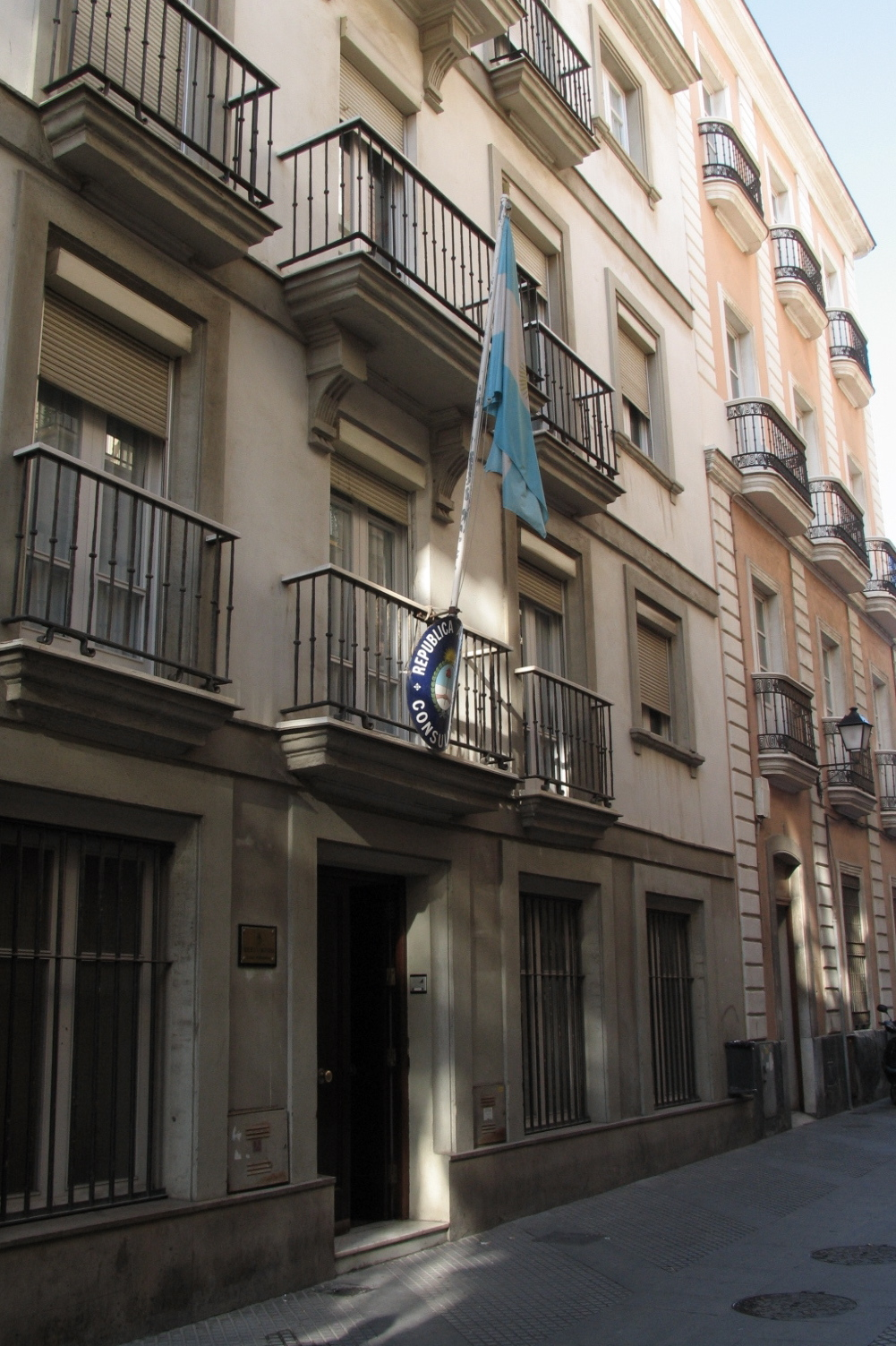 Consulado Argentino en Cádiz.